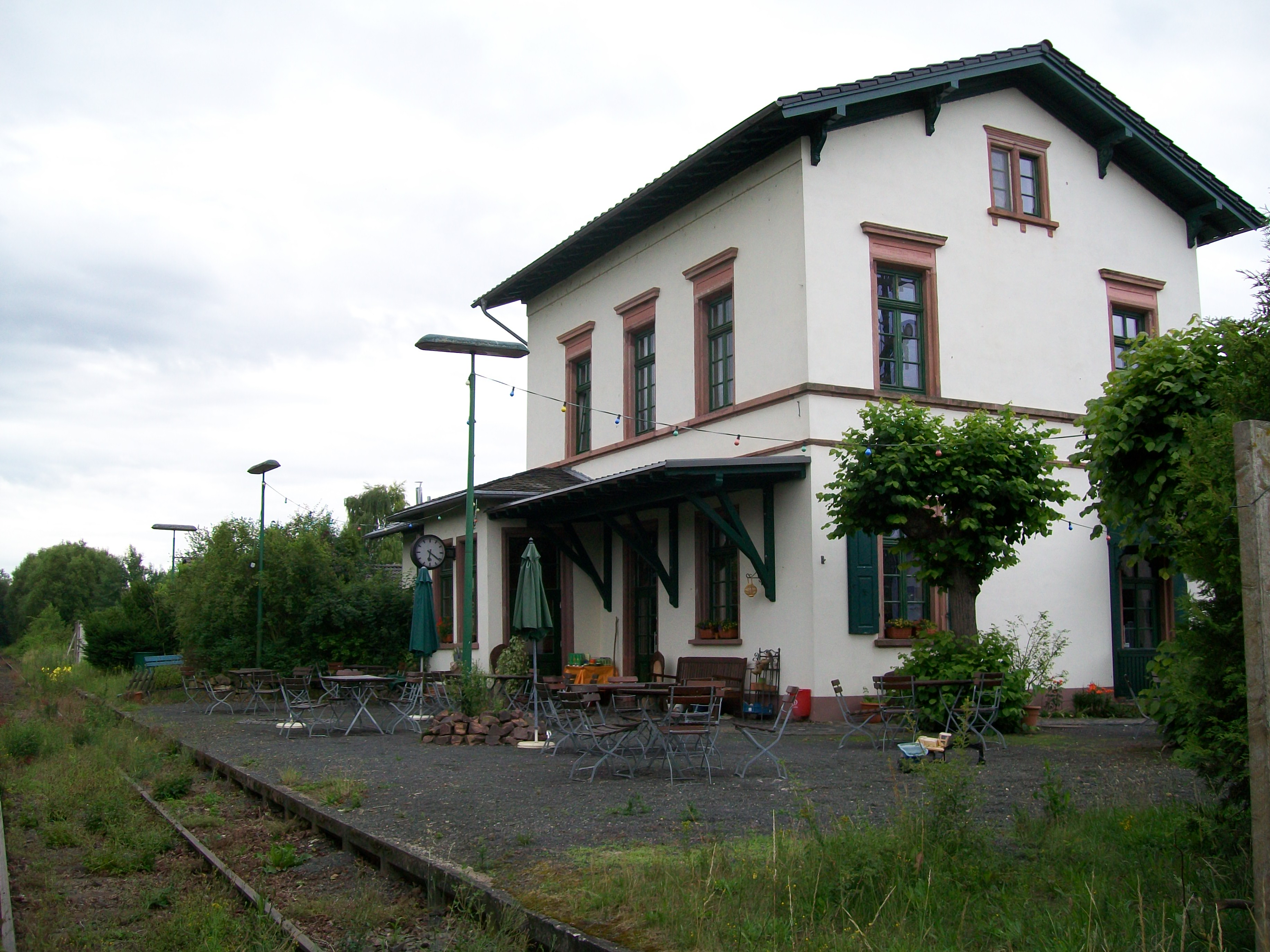 Der stillgelegte Bahnhof in Flacht im Juni 2011, inzwischen eine Gastwirtschaft